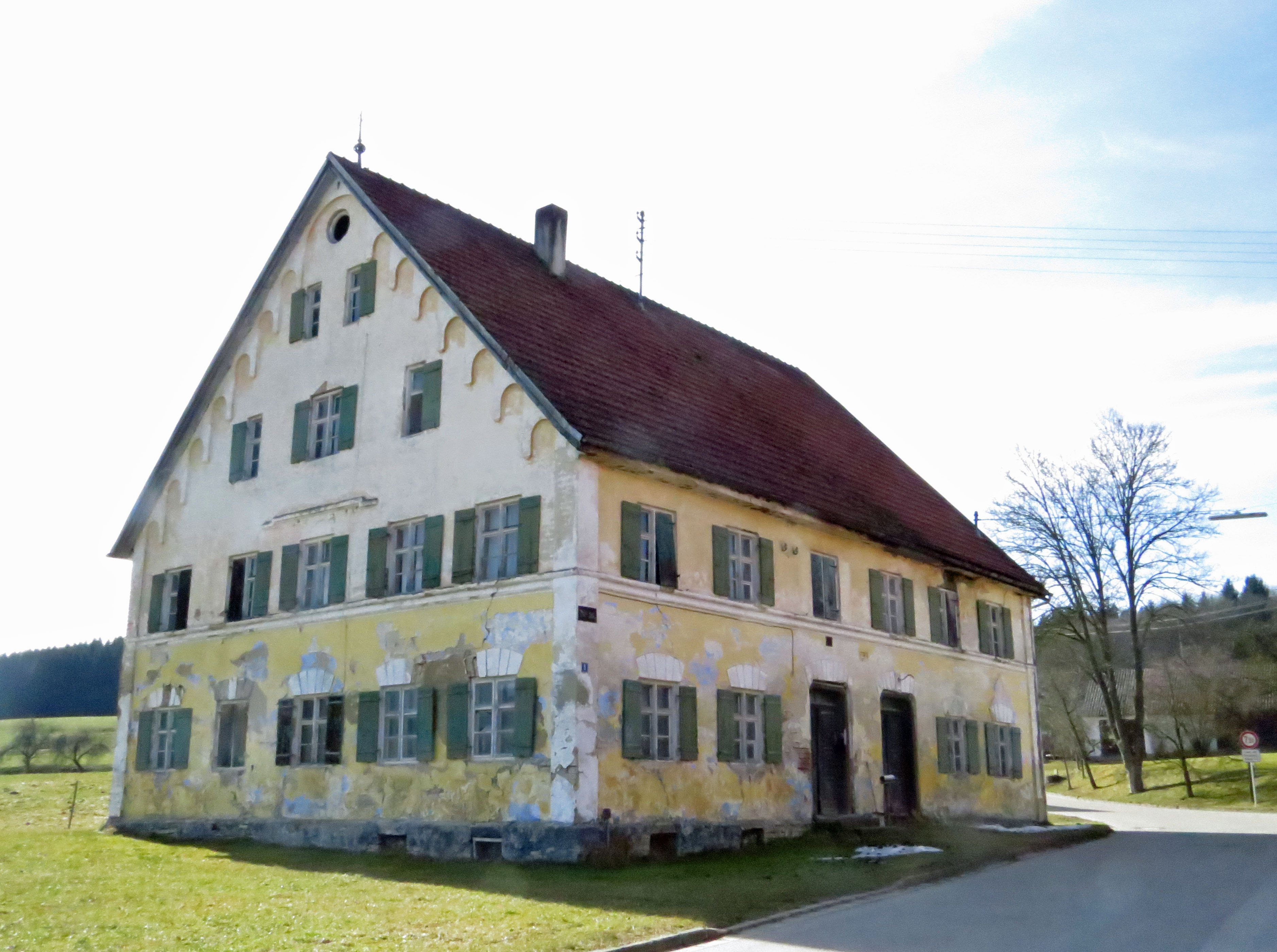 Ehem. Mühle in Hairenbuch, Waltenhausen